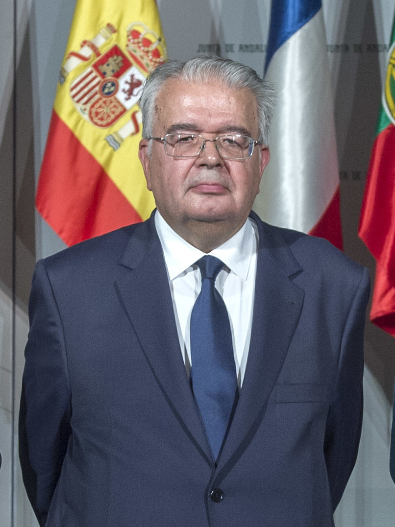 La presidenta de la Junta, Susana Díaz, ha apelado al diálogo y al consenso, porque sólo así, "desde el respeto a las leyes y a la Constitución, podremos conciliar y lograr instaurar un periodo de estabilidad y progreso". Díaz, que ha recibido en San Telmo a los presidentes de los Tribunales Constitucionales (TC) de España, Juan José González Rivas; Portugal, Manuel da Costa Andrade, e Italia, Paolo Grossi, y al del Consejo Constitucional de Francia, Laurent Fabius, ha puesto en valor los tribunales, cortes y salas que imparten justicia constitucional, "elemento esencial para nuestro sistema político y jurídico por su doble función de intérpretes y garantes de la Constitución". Igualmente, Susana Díaz ha celebrado que Sevilla sea la sede para "reflexionar en torno al constitucionalismo en un momento crítico para nuestro país" tras los acontecimientos de Cataluña. Díaz ha reiterado que "Andalucía siempre estará por el cumplimiento y respeto a la legalidad, que les da seguridad y libertad a los ciudadanos, y defenderá el Estado de Derecho". Y en esta tarea, añadió, "es fundamental contar con unos altos tribunales que vigilen y actúen en caso de desviación".